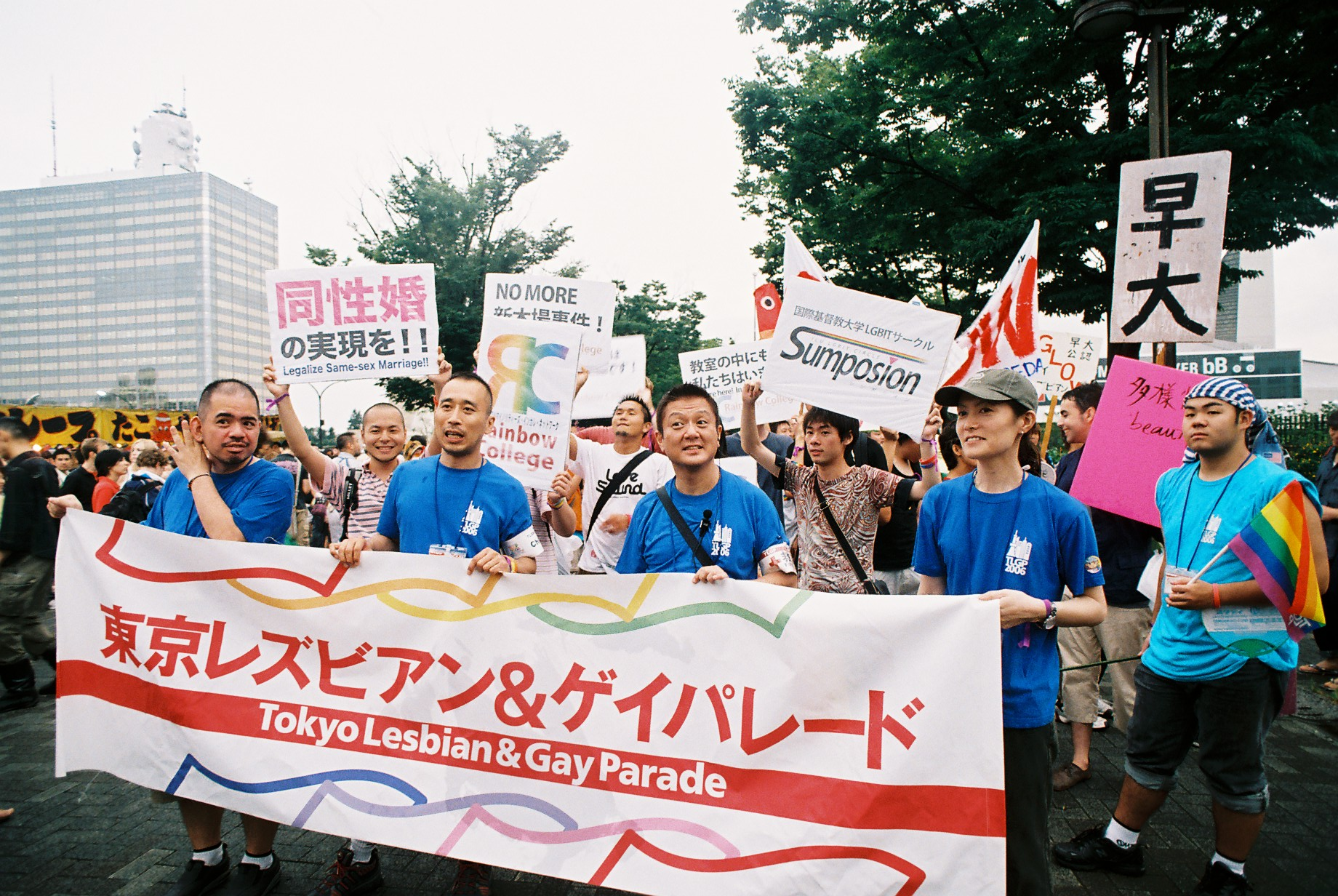 Défilé de la Gay Pride à Tokyo au Japon, août 2006